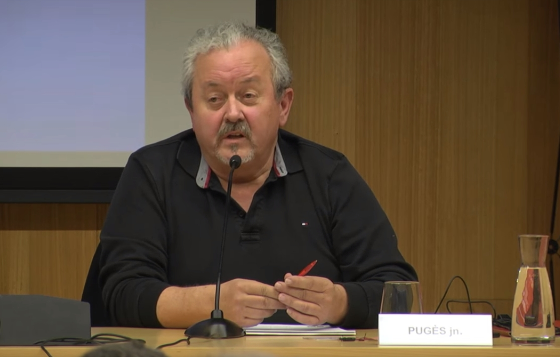 Mesa redonda: Agentes sociales y el proceso de decisión Moderatzailea: Pedro IBARRA. Univ. del País Vasco / Euskal Herriko Unibertsitatea Zelai NIKOLAS. Gure Esku Dago, GED Stephen NOON. Yes Scotland Pere PUGÈS. Assemblea Nacional Catalana, ANC